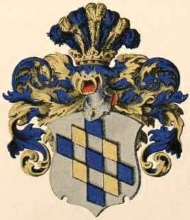 Buddenbrocki suguvõsa aadlivapp